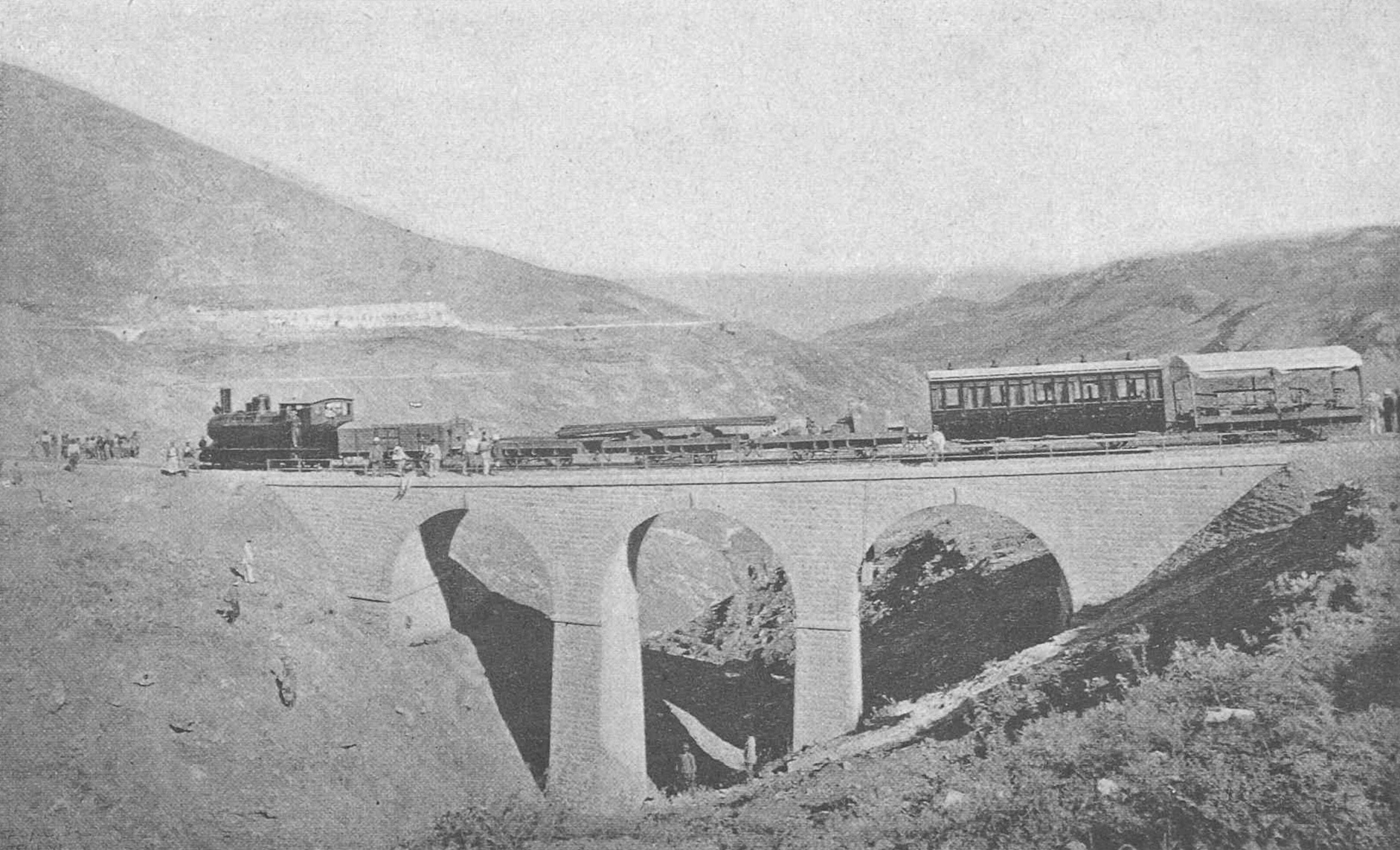 Viaduc de Khan-M'Rad